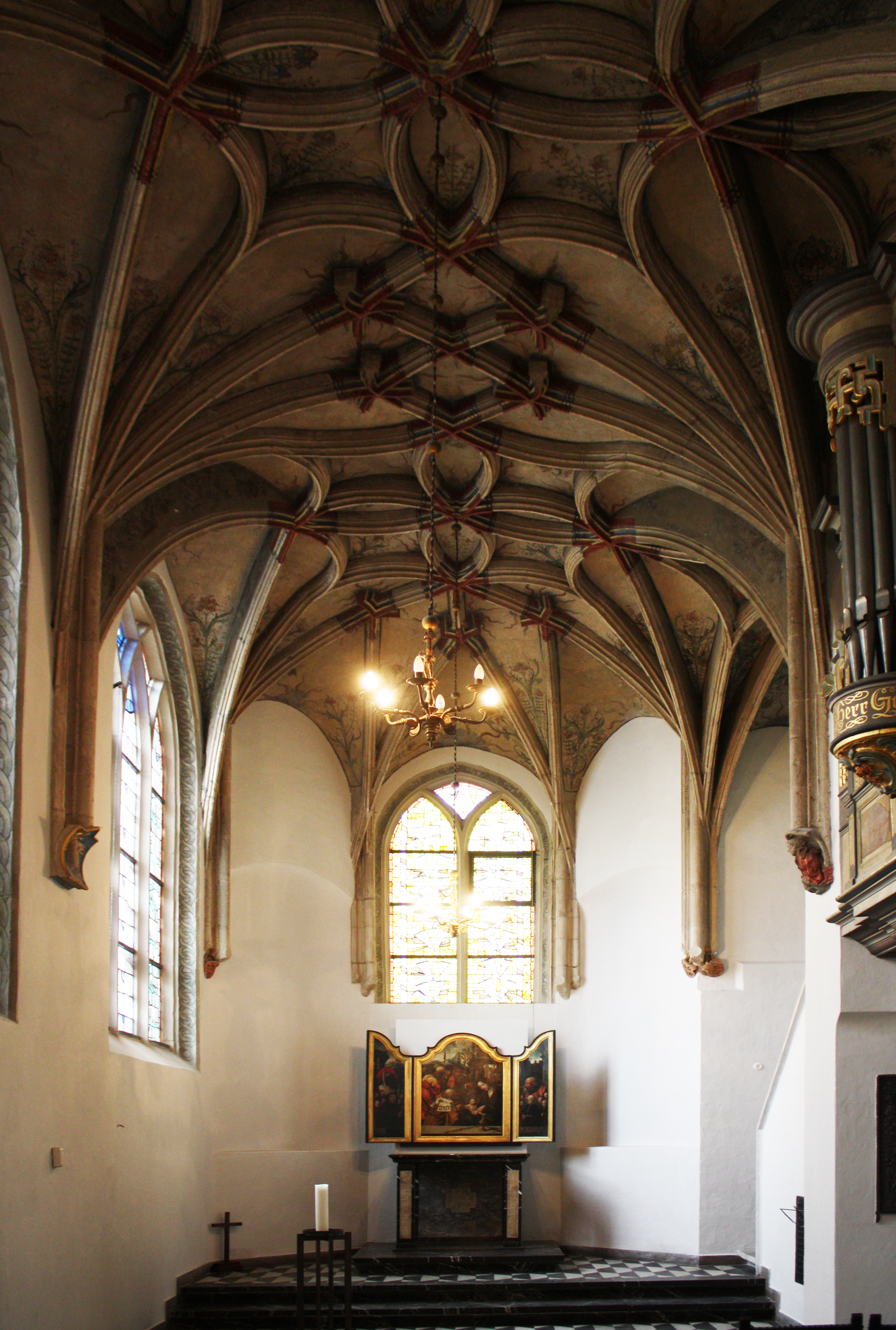 Kölner Kartause, Hardenrathkapelle (oder neue Sakristei) der Ev. Kartäuserkirche